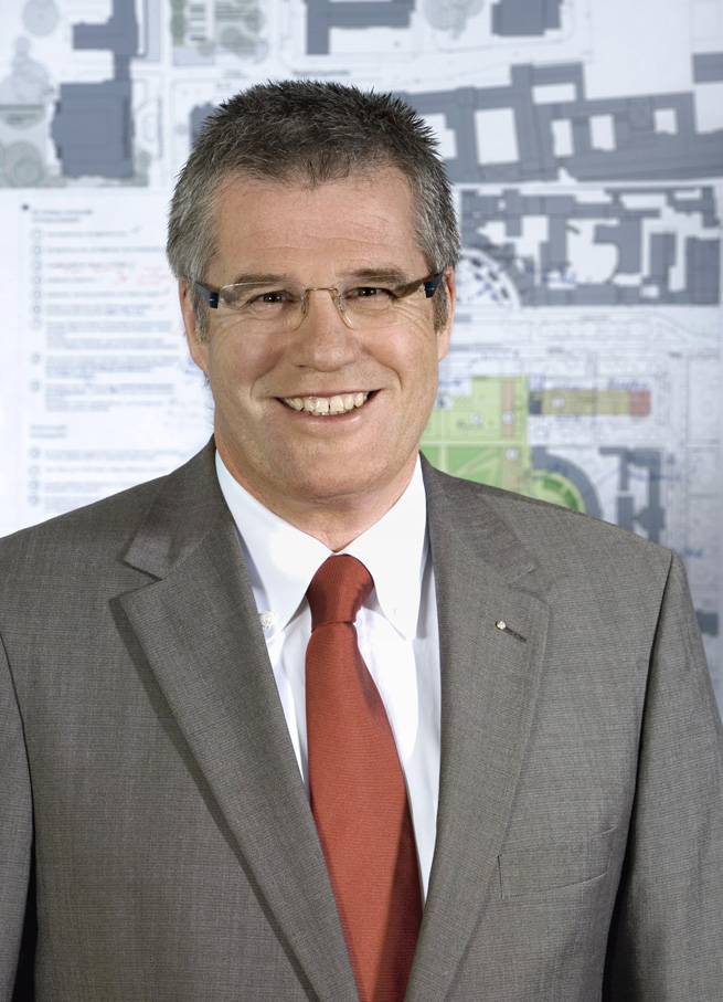 Hanspeter Faas, Geschäftsführer der Bundesgartenschau Koblenz 2011 GmbH